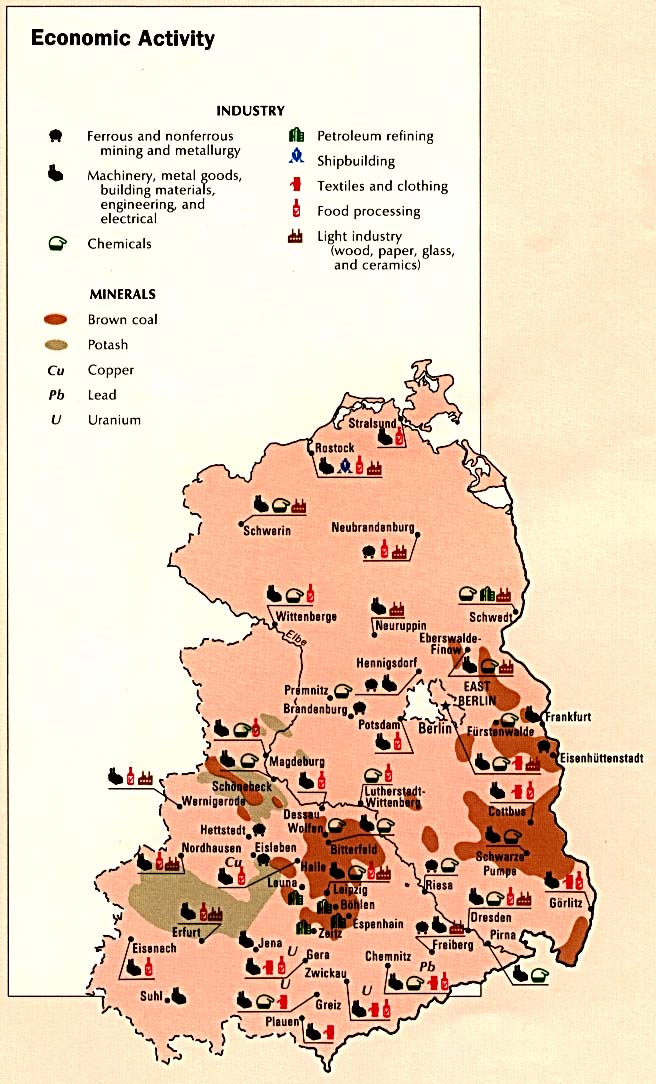 DDR-Wirtschaft (public domain) aus bei Note: These maps are from the Atlas of Eastern Europe, published by the U.S. Central Intelligence Agency in August 1990.